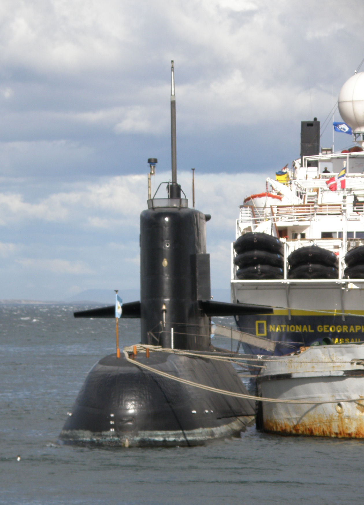 Ushuaia - Sous-marin d'attaque à propulsion classique de classe TR-1700 le ARA Santa Cruz (S-41)